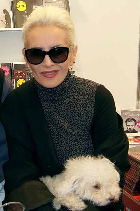 Olga Jackowska "Kora" i Ramona.